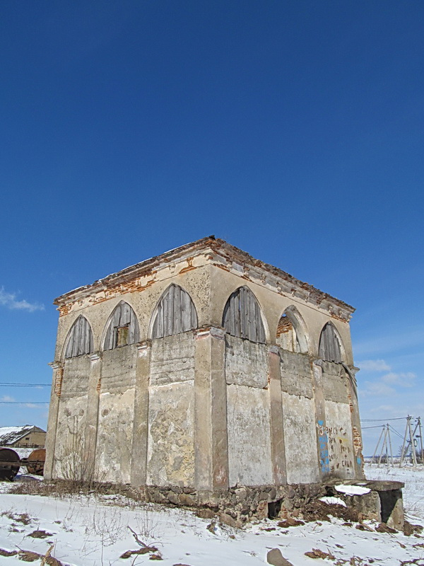 Конна. Лядоўня